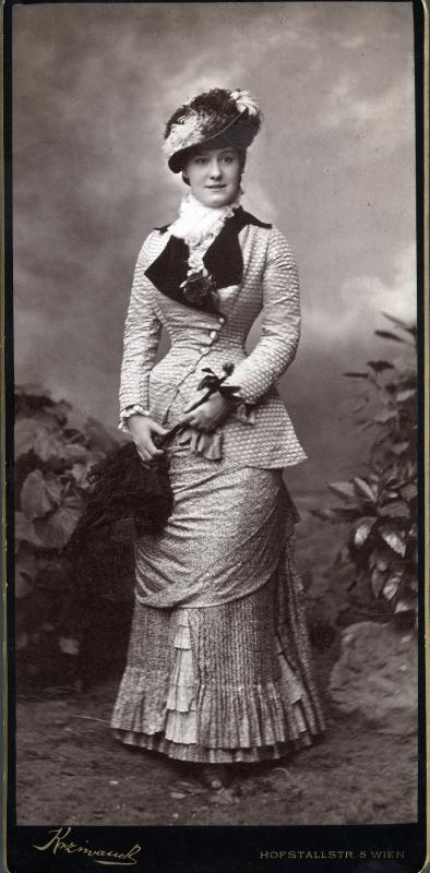 Antonie Janisch, Schauspielerin am Wiener Burgtheater. Bildnis (ganze Figur stehend, leicht rechts).